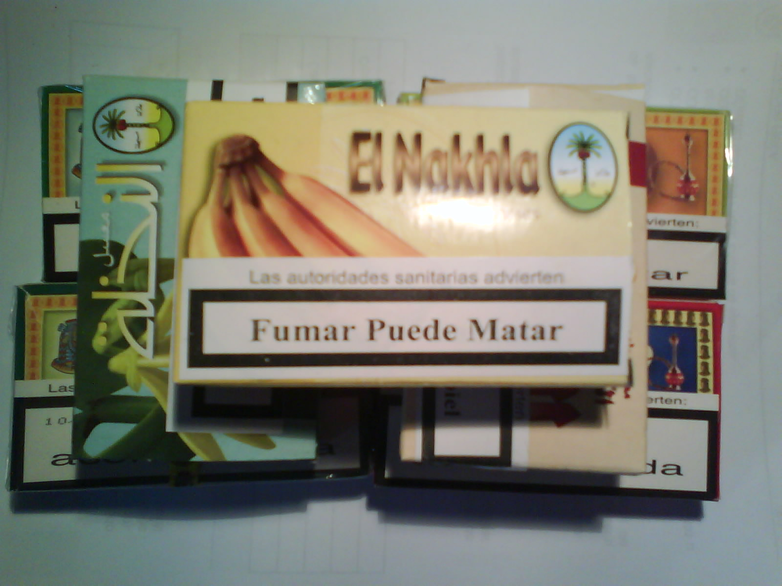 Fotografía que incluye un muestra de varios paquetes de tabaco para cachimba (pipa de agua).